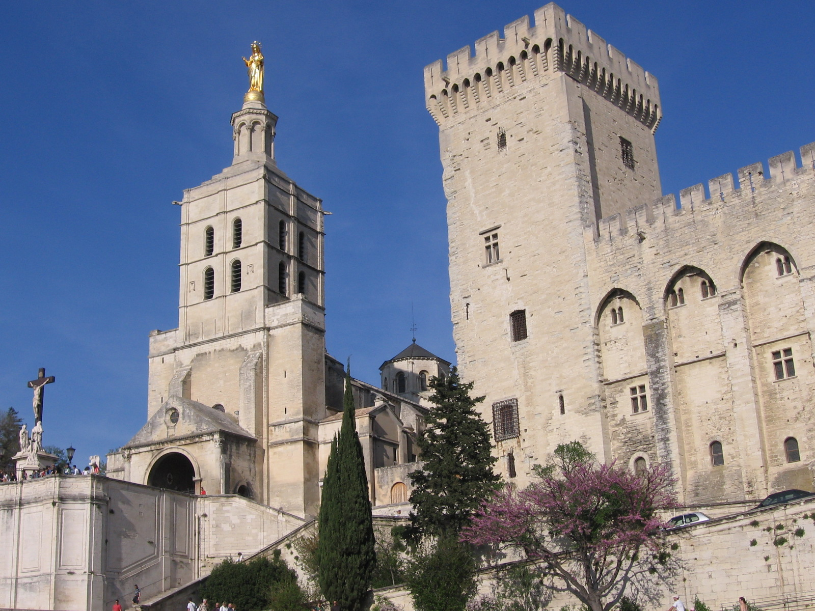 Palais des papes de Avignon, édifié à partir de 1335, c'est le plus important palais gothique du monde.